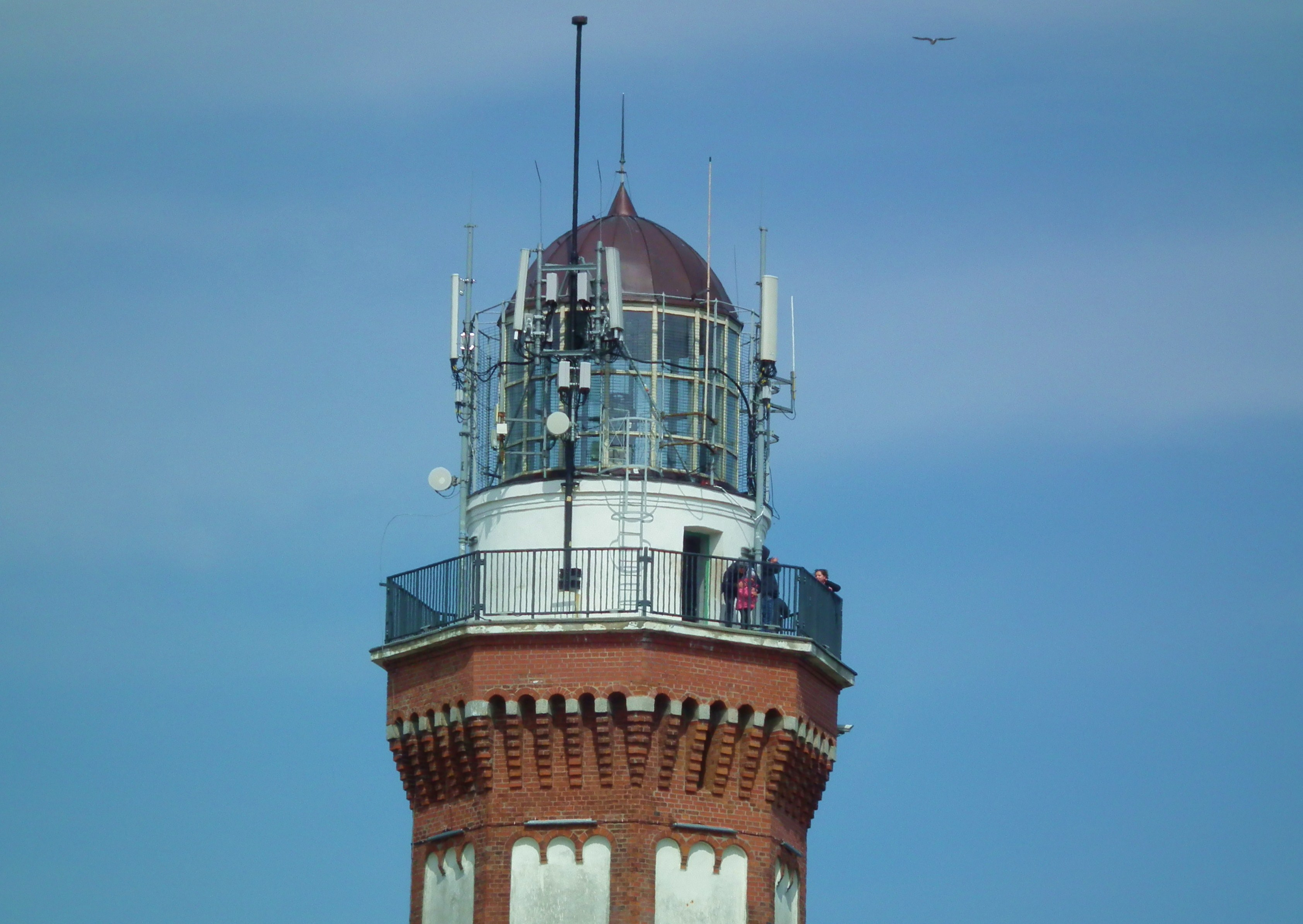 Górna część latarni mor. w Niechorzu.